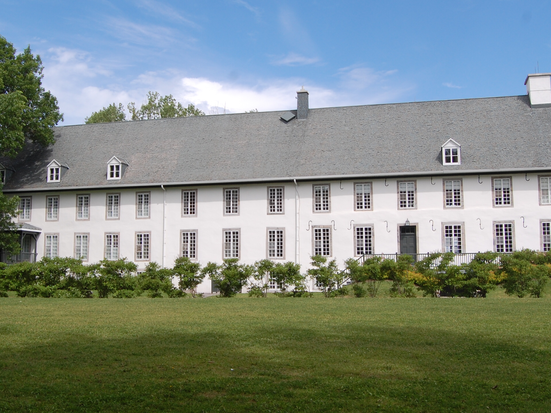 Manoir du Domaine Maizerets, dans l'arrondissement La Cité-Limoilou de la ville de Québec.